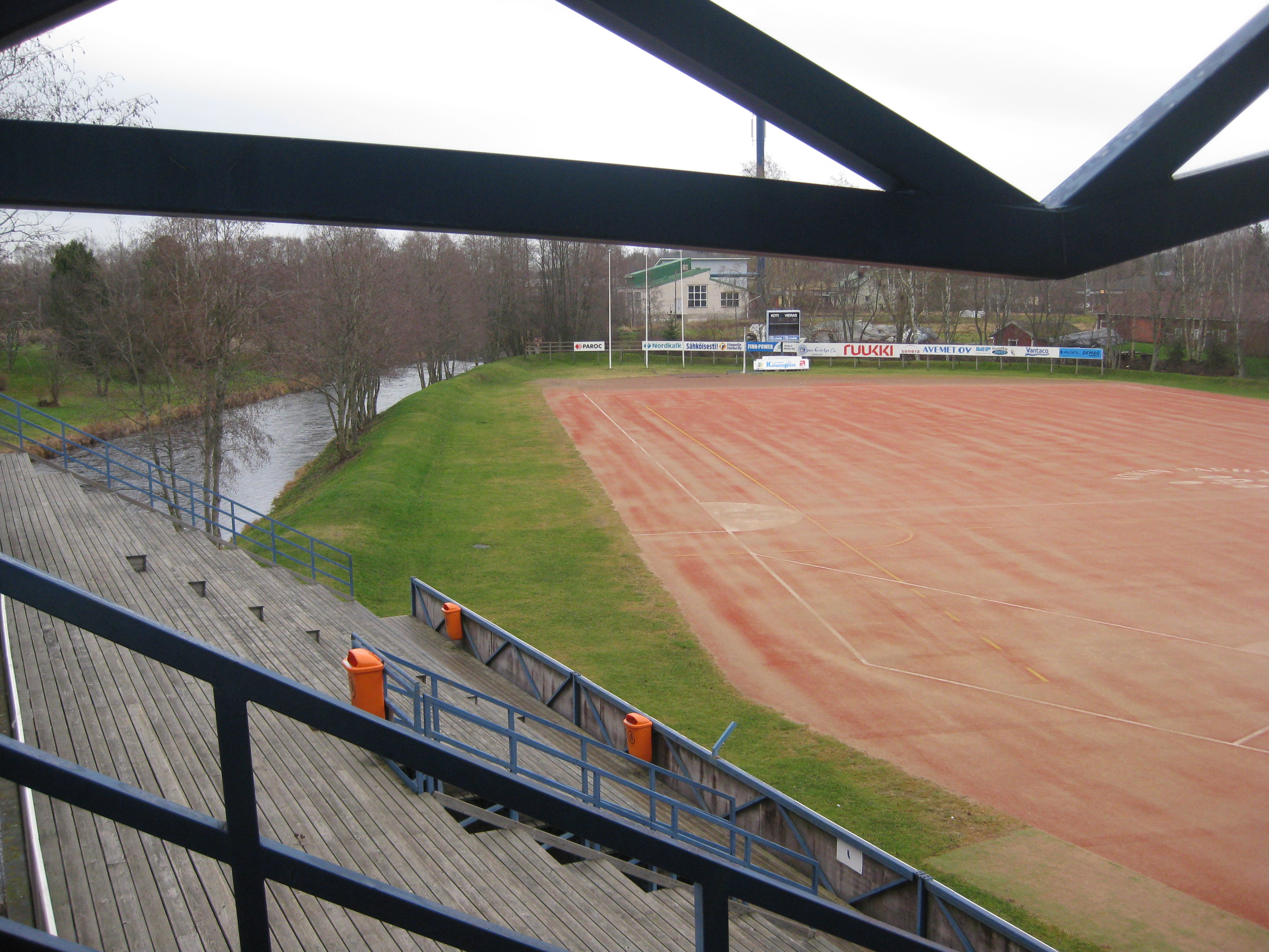 Saarikenttä